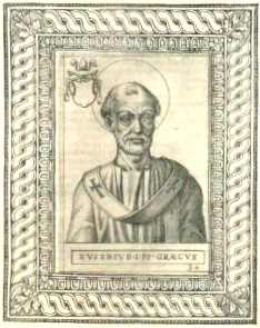 Pope Eusebius, copperplate from Storia e Papato Eusebio